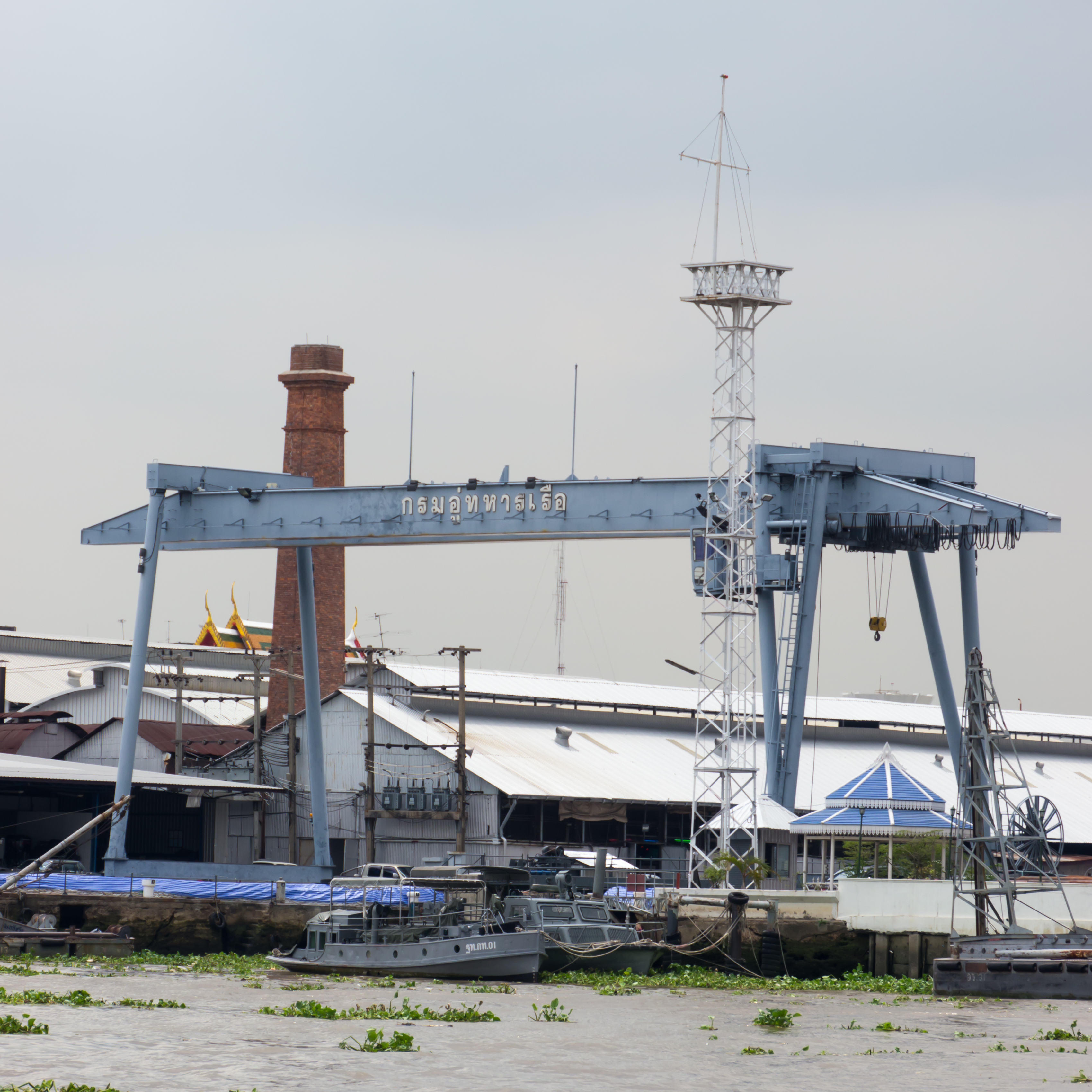 กรมอู่ทหารเรือ (ปล่องควันหม้อน้ำ)